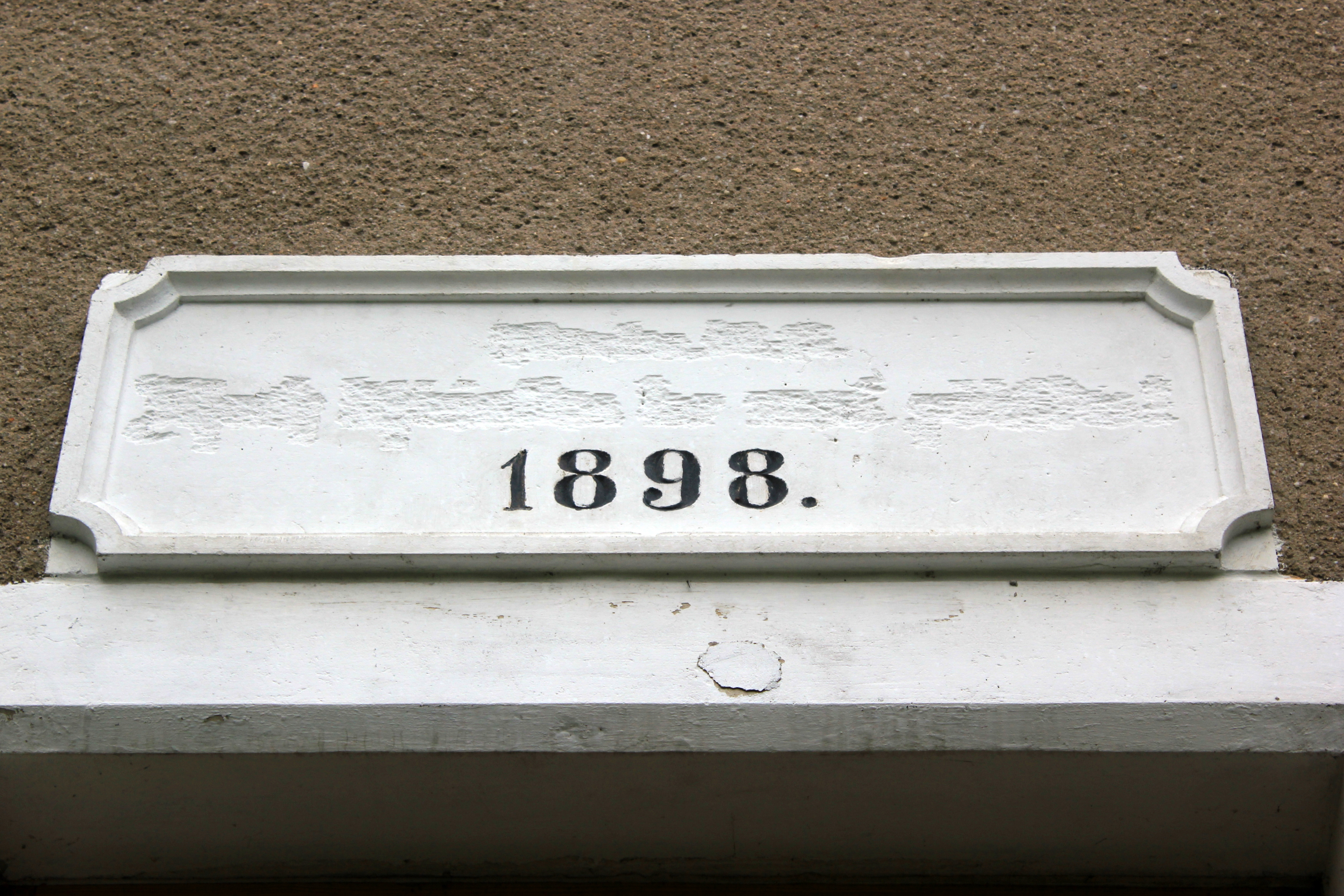 Hornjoserbsce: Něhdyši serbski napis "Dajće dźěćatkam ke mni přińć" při starej šuli w Stróži.